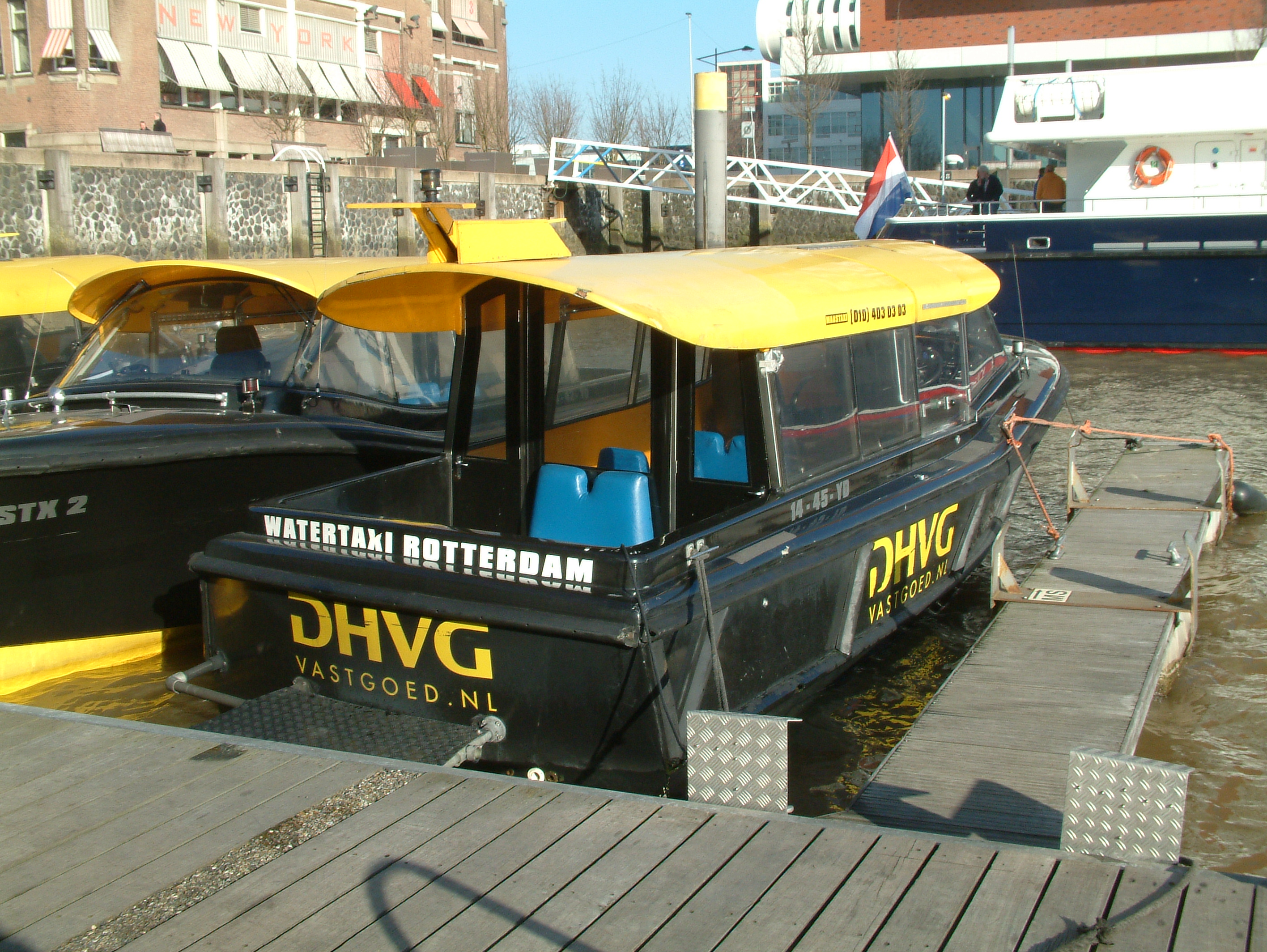 Watertaxi in Rotterdam